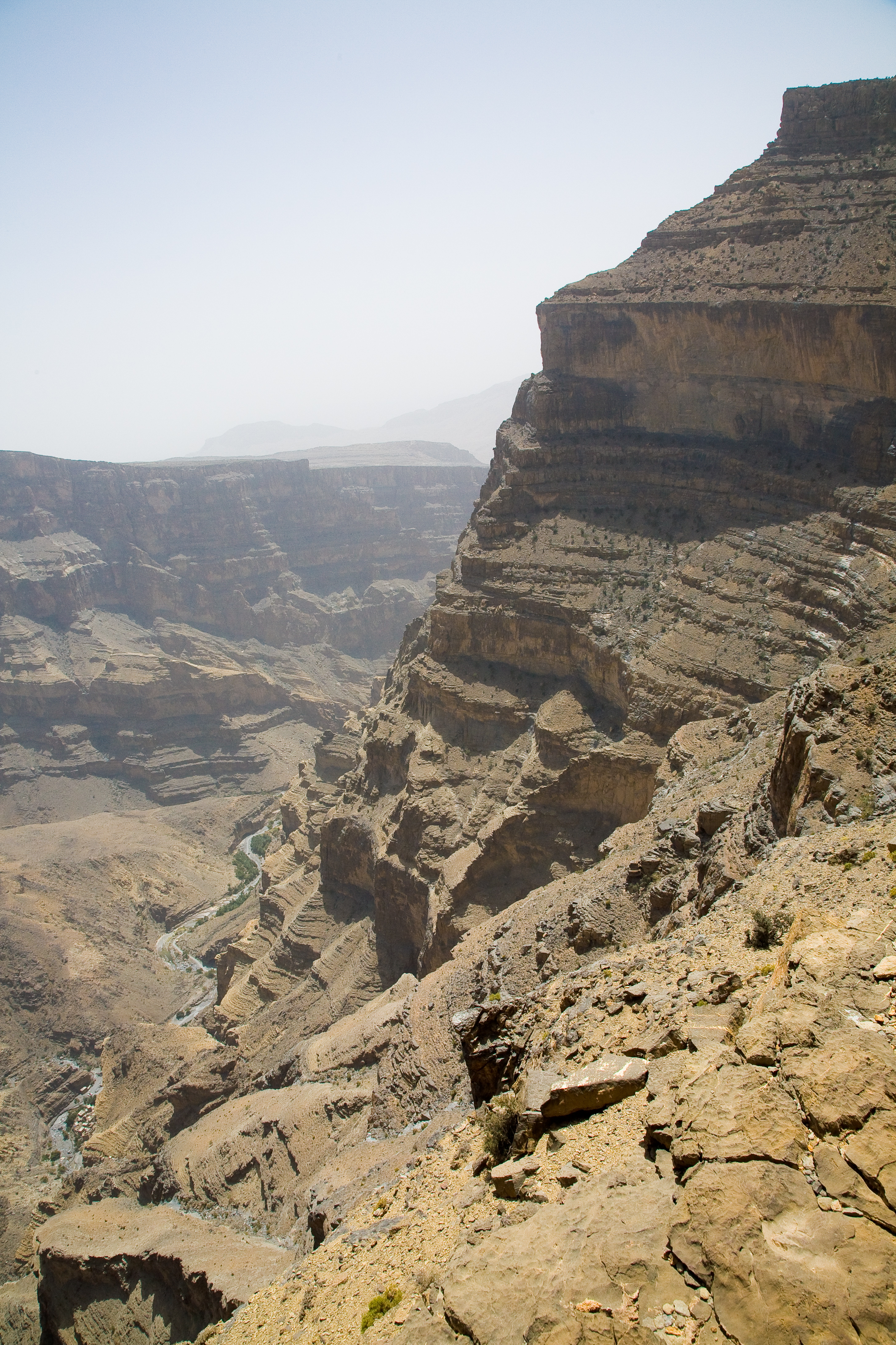 Jebel Shams, Oman